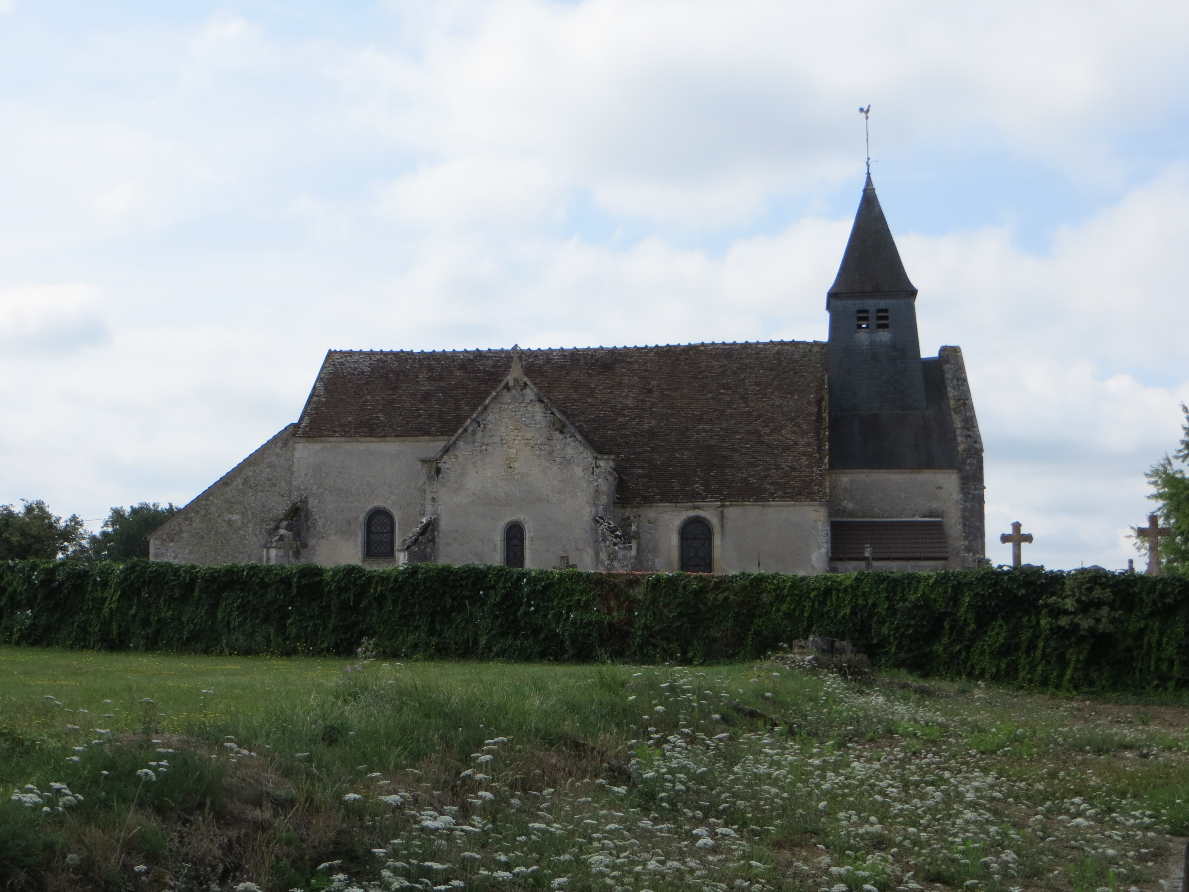 Vue générale de l'église